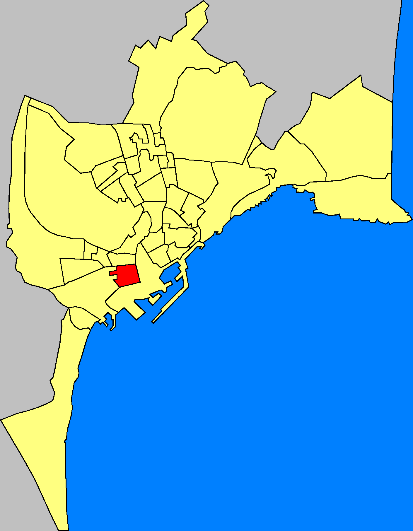 Barrios de la ciudad de Alicante